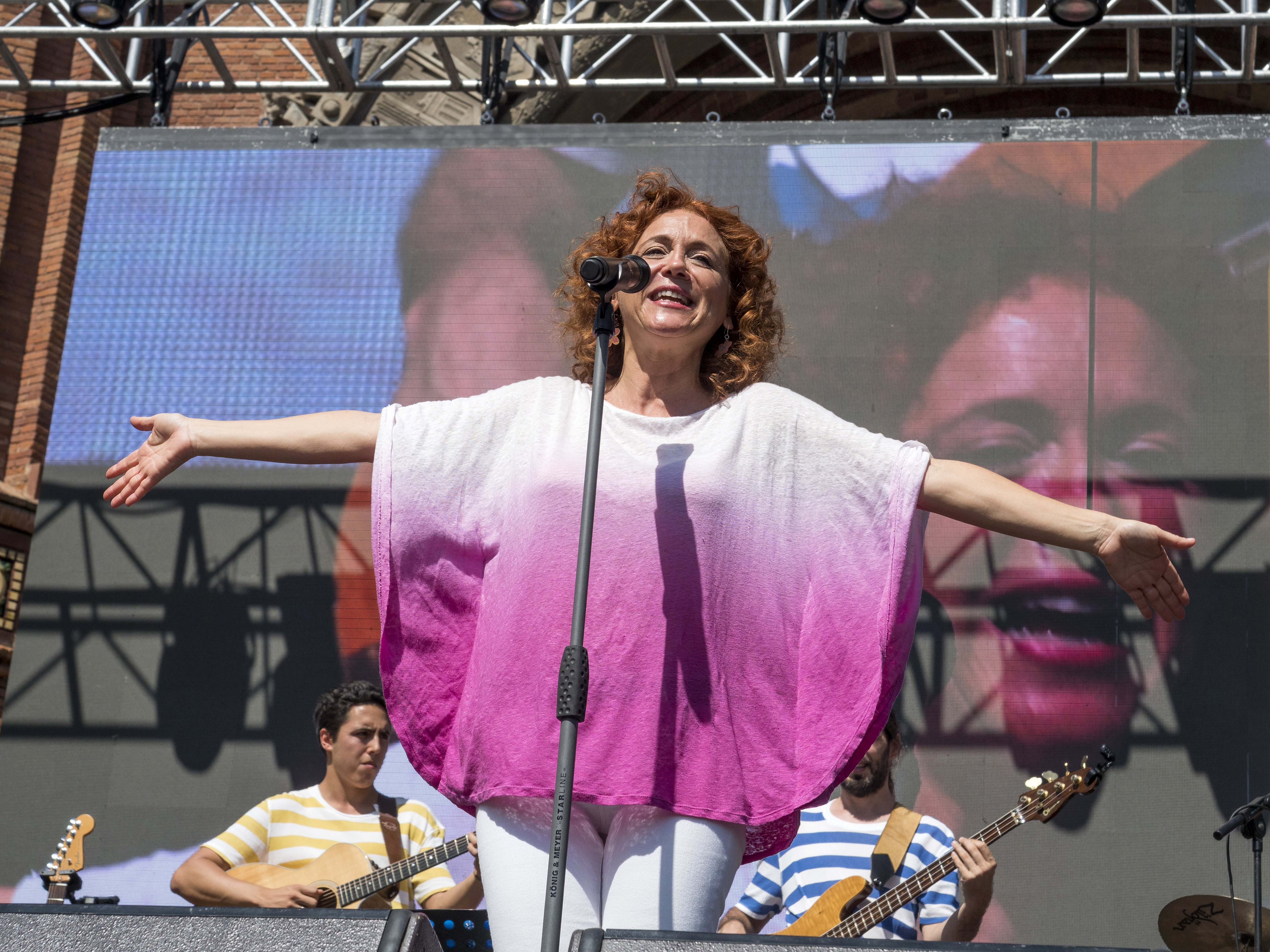 Dàmaris a la Festa per la Llibertat, 11 de setembre 2018.